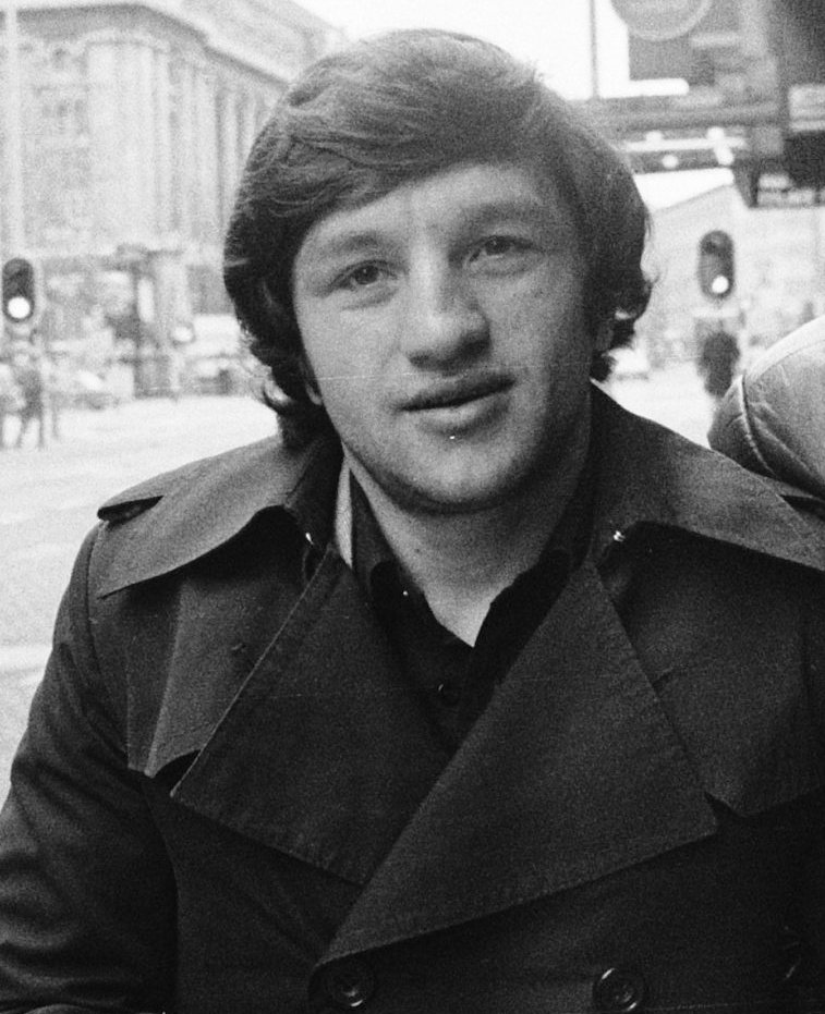 Morgen speelt Feyenoord tegen Dynamo Tiflis om de Europacup-II, twee spelers in de straat